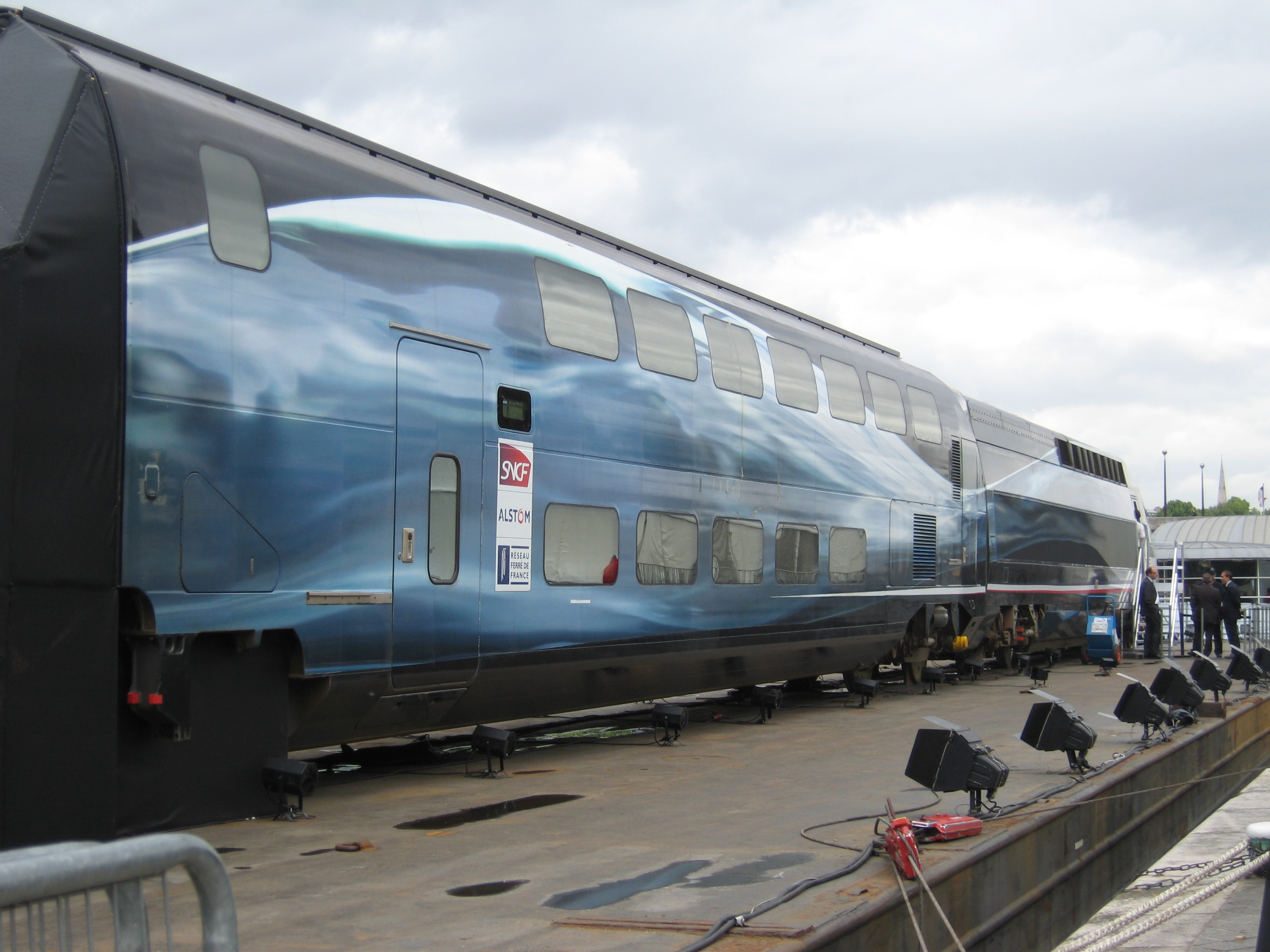 TGV Rame 4402 (V150) exposée au pied de la tour Eiffel